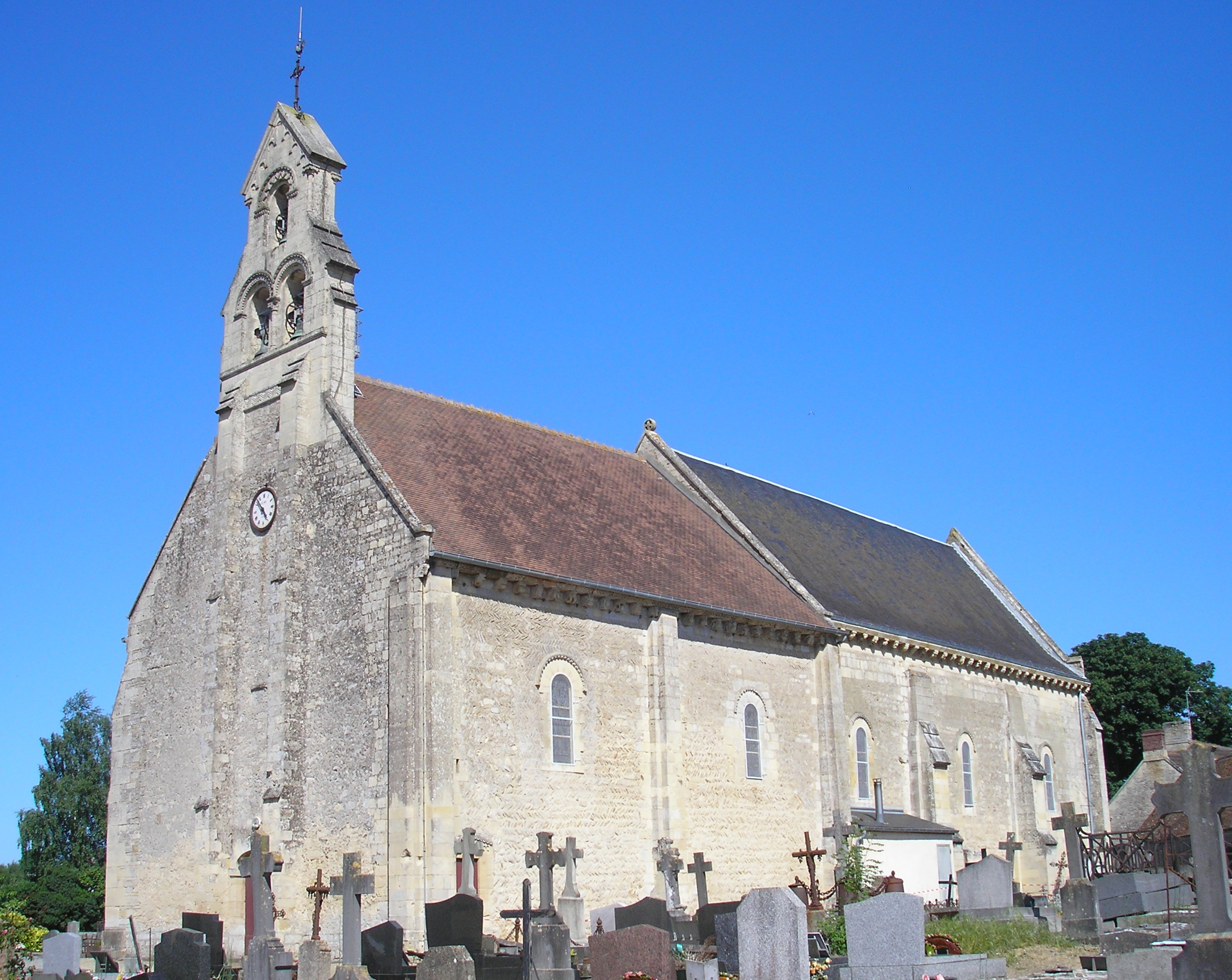 Mathieu (Normandie, France). L'église Notre-Dame-de-l'Assomption.